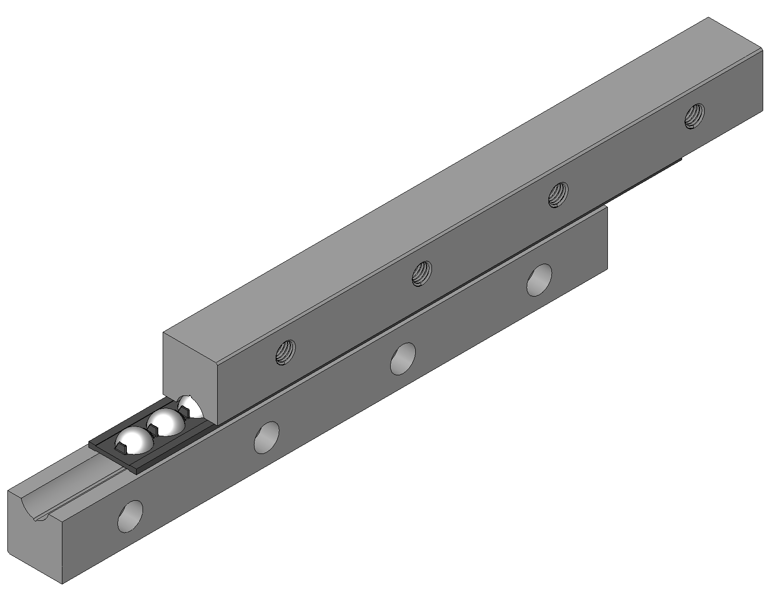 Linearfuehrung nach DIN 644. Die DIN 644 legt die Einbau- und Anschlussmasse fuer die Fuehrungen fest. Der innere Aufbau bleibt dem Hersteller ueberlassen. Die hier gezeigte Fuehrung besitzt Kugeln als Waelzkoerper. Die Kugeln haben Vierpunktkontakt.